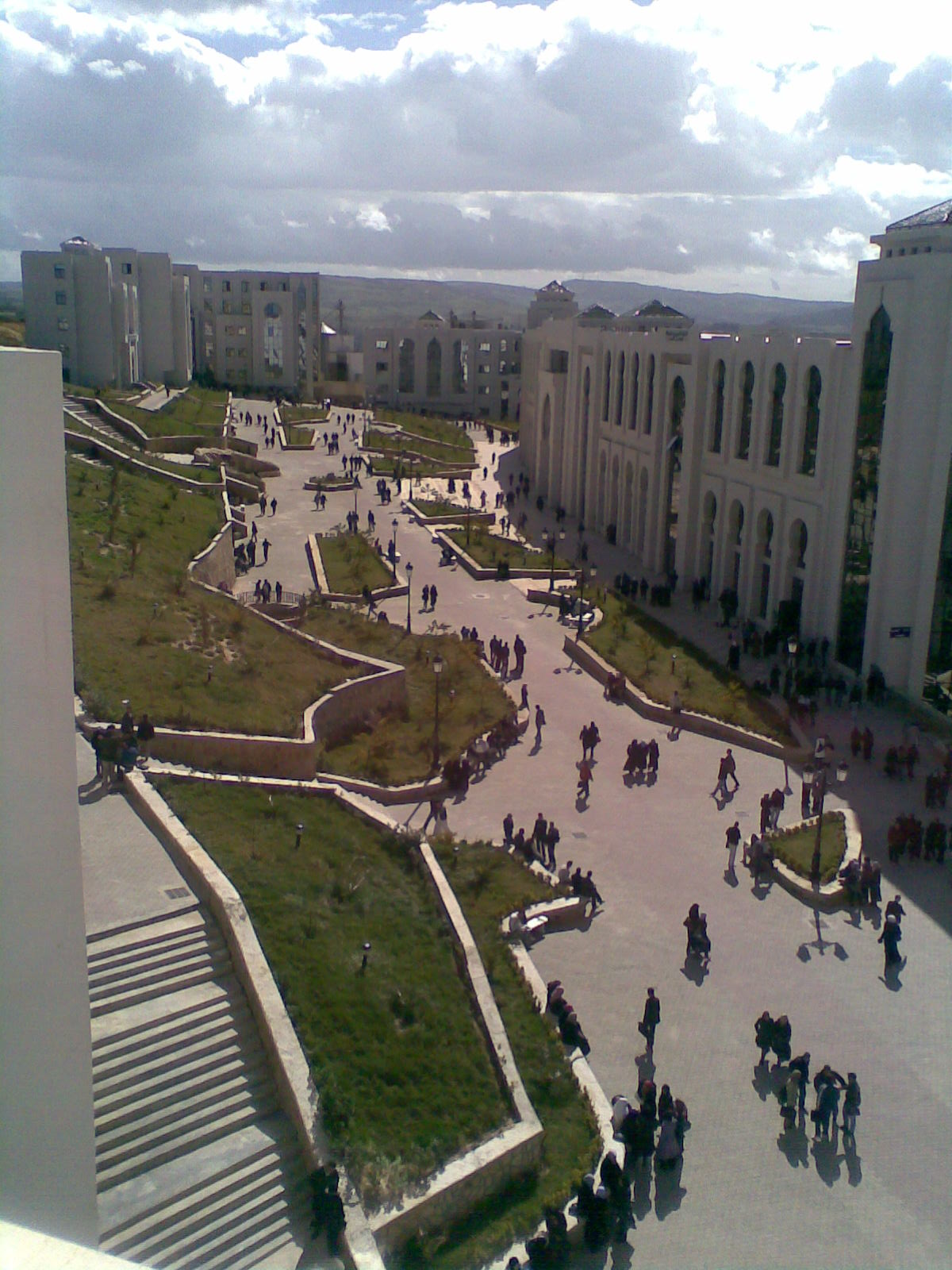 Pol universitaire dans médéa